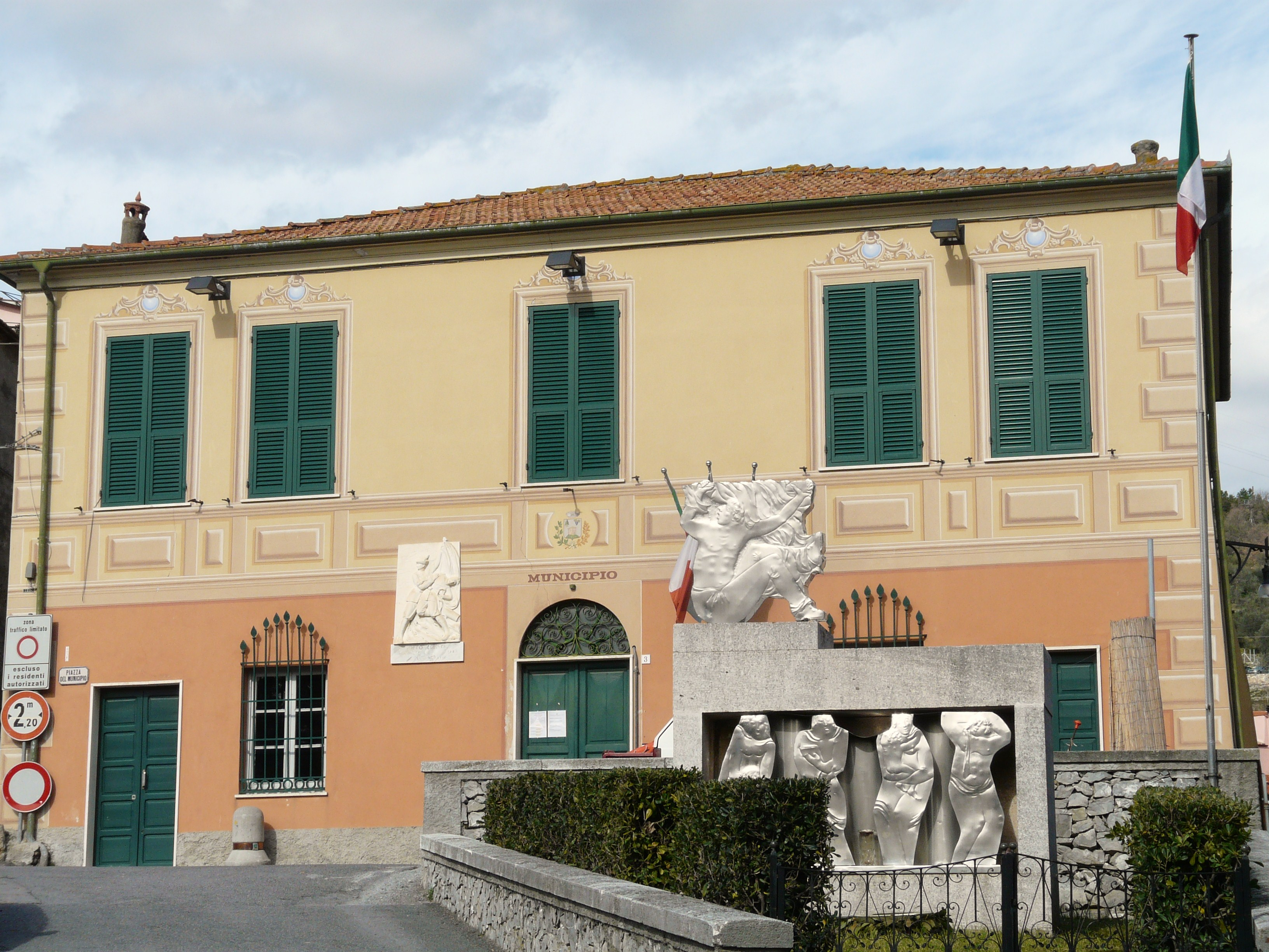 Municipio di Orco Feglino, Liguria, Italia